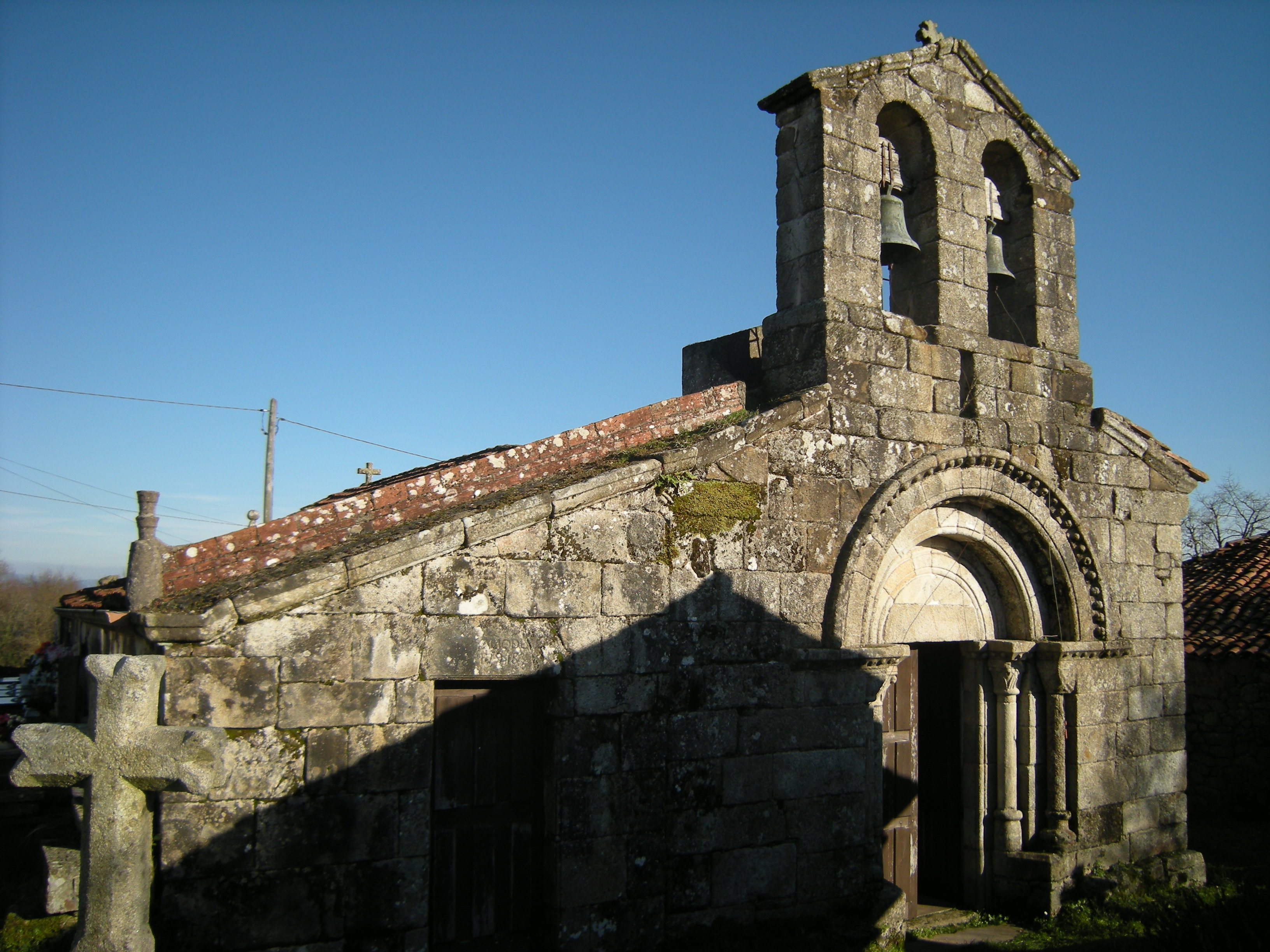 Construida a finales del siglo XII o principios del siglo XIII, conserva como elementos más destacados la portada occidental y las pinturas murales encima del arco triunfal.